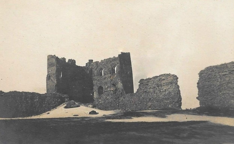 Беларуская (тарашкевіца): Крэва (Kreva), замак. Княская вежа (Kniaskaja)